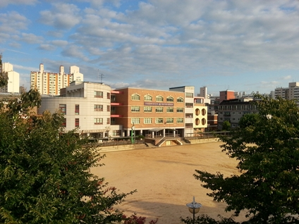 인천만수초등학교